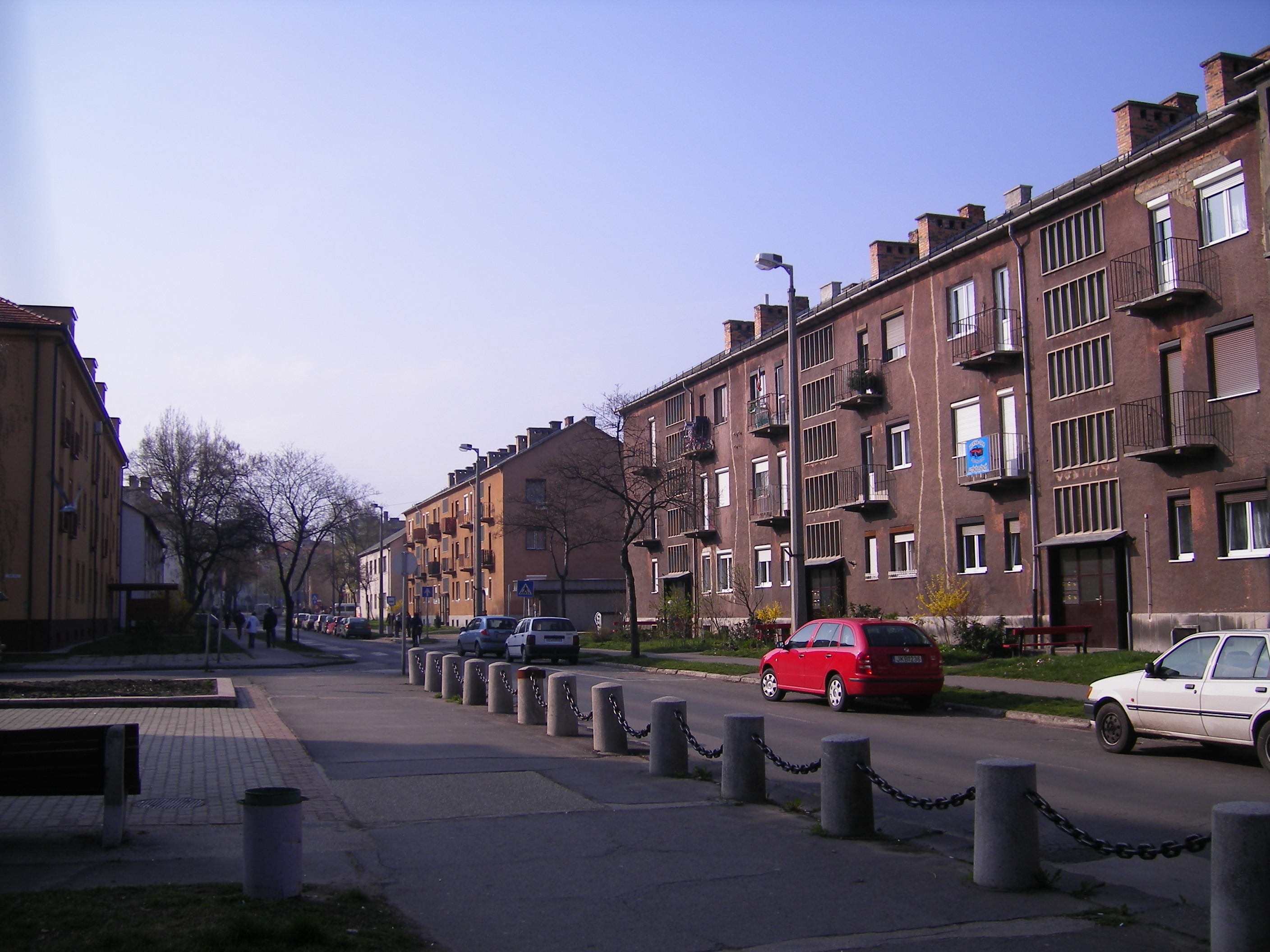 Oroszlány - Fürst Sándor utca